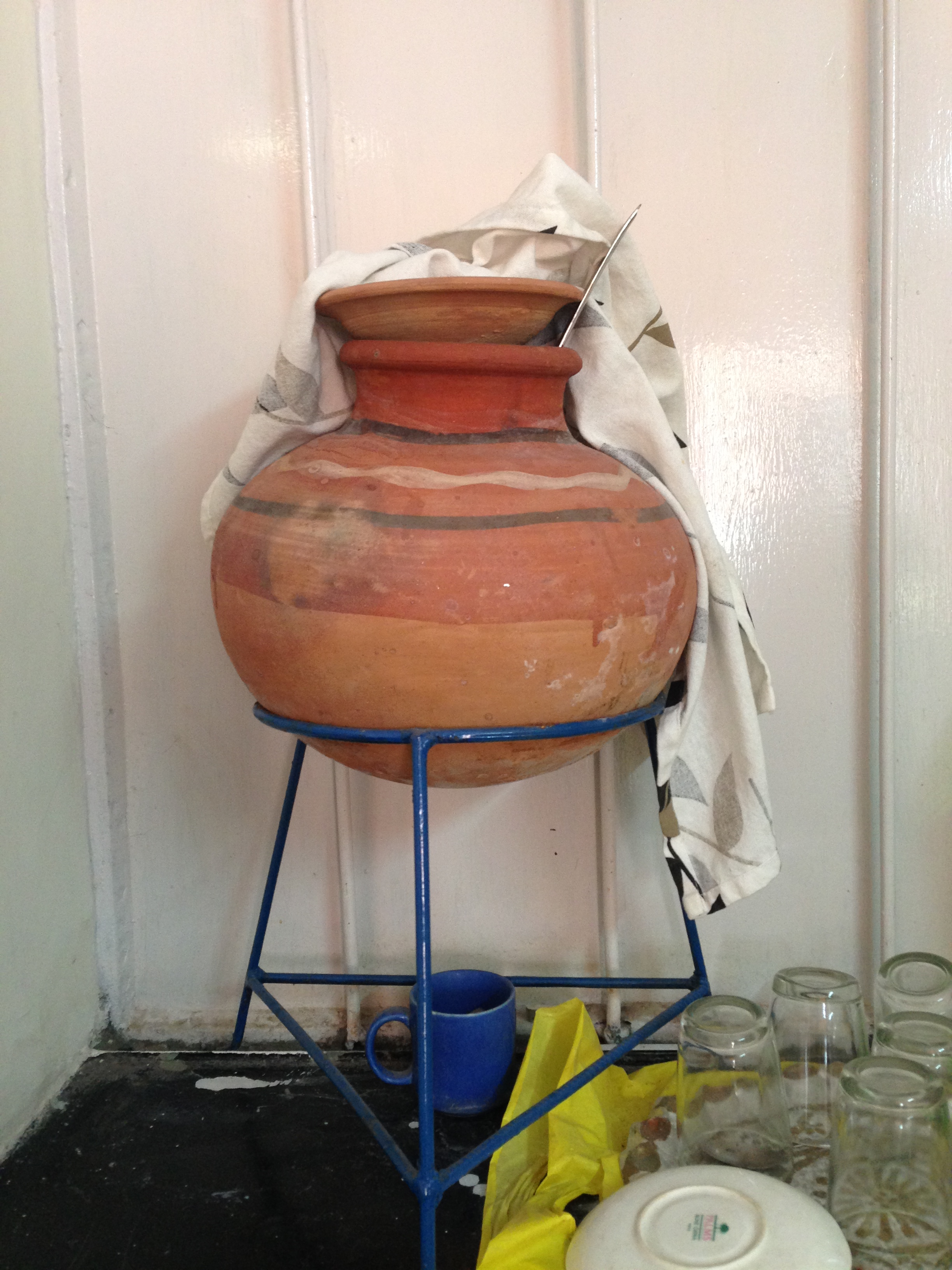 ਪੰਜਾਬੀ: ਇਸ ਘੜੇ ਨੂੰ ਕੁਦਰਤੀ ਤੌਰ ਤੇ ਪੀਣ ਯੋਗ ਪਾਣੀ ਠੰਡਾ ਕਰਨ ਲਈ ਵਰਤਿਆ ਜਾਂਦਾ ਸੀ ਜੋ ਅੱਜ ਕੱਲ ਲਗਪਗ ਖ਼ਤਮ ਹੋ ਚੁੱਕਿਆ ਹੈ।